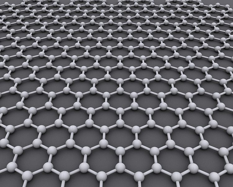 Lámina de grafeno